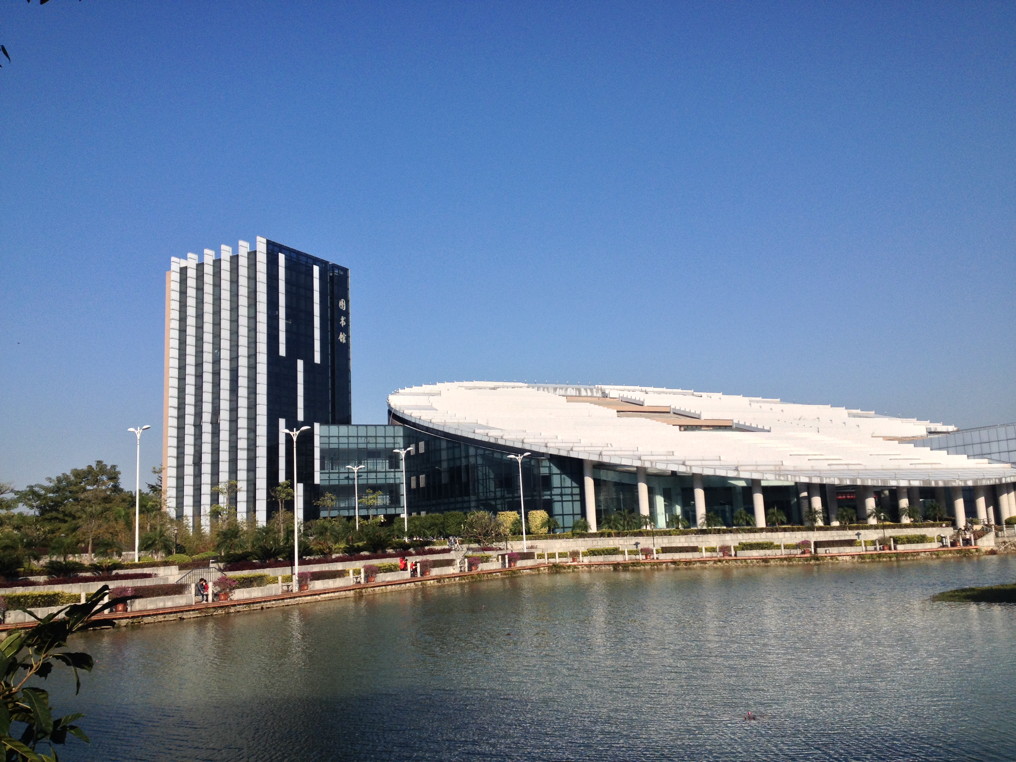 福建医科大学图书馆外景